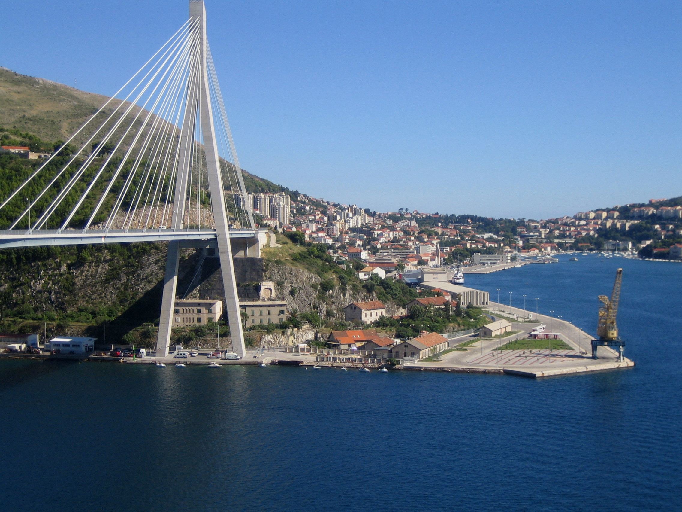 Acceso norte a la ciudad de Dubrovnik, Croacia.